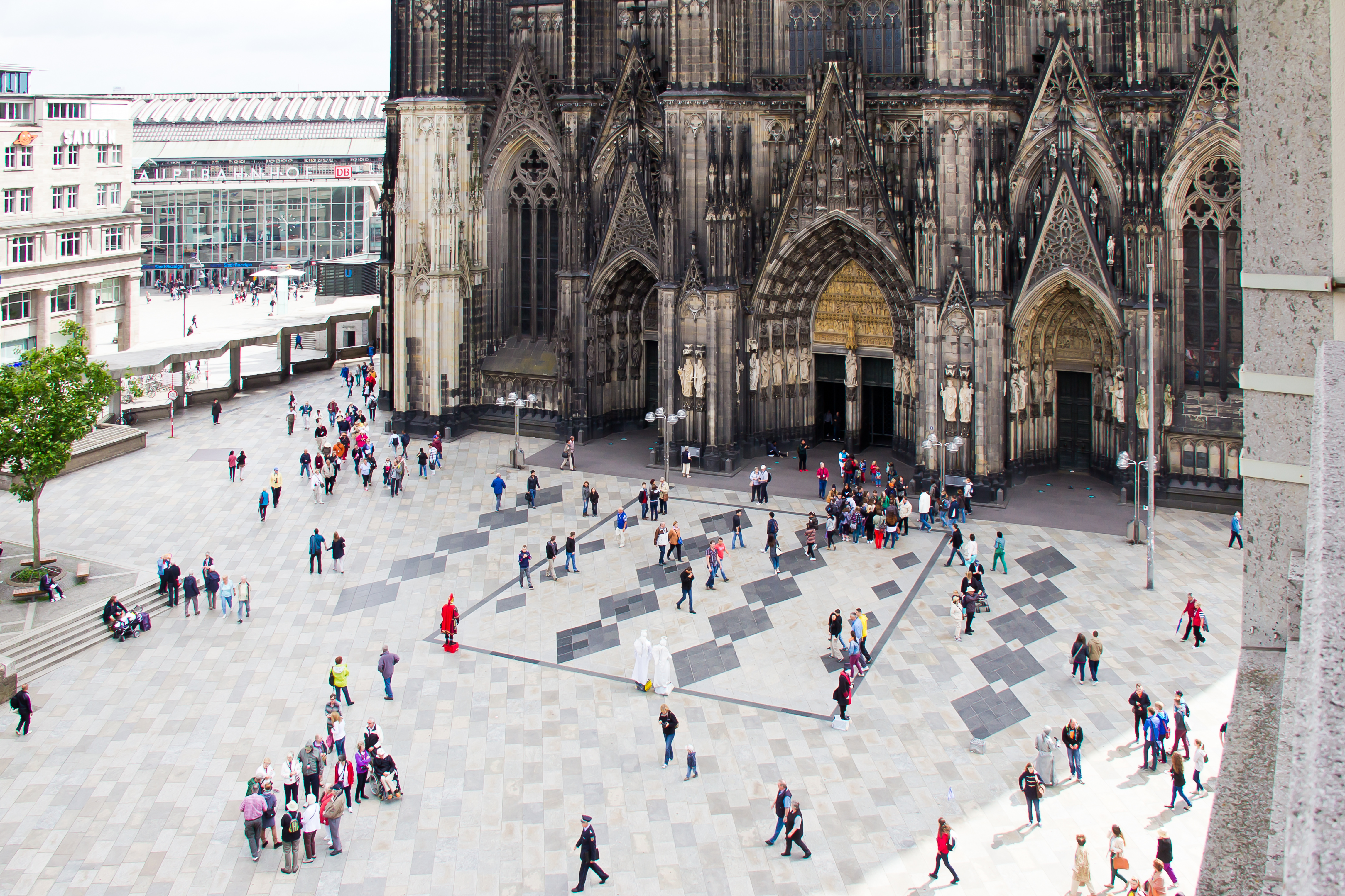 Kölner Dom - DomplatteThis is a photograph of an architectural monument.